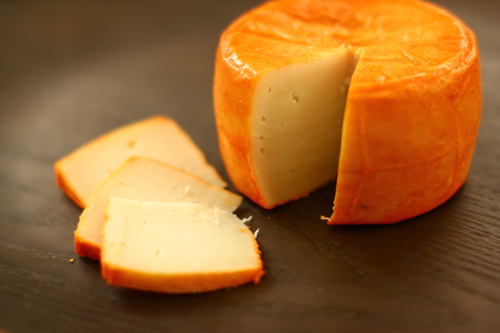 Queso El Cuco al pimentón, un queso de cabra de elaboración artesanal, elaborado por Antonio Sánchez en su quesería familiar de Lagunilla, Salamanca.